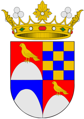 Blasón concedido por pretendiente carlista Carlos VII a Buenaventura de Oriol y Salvador